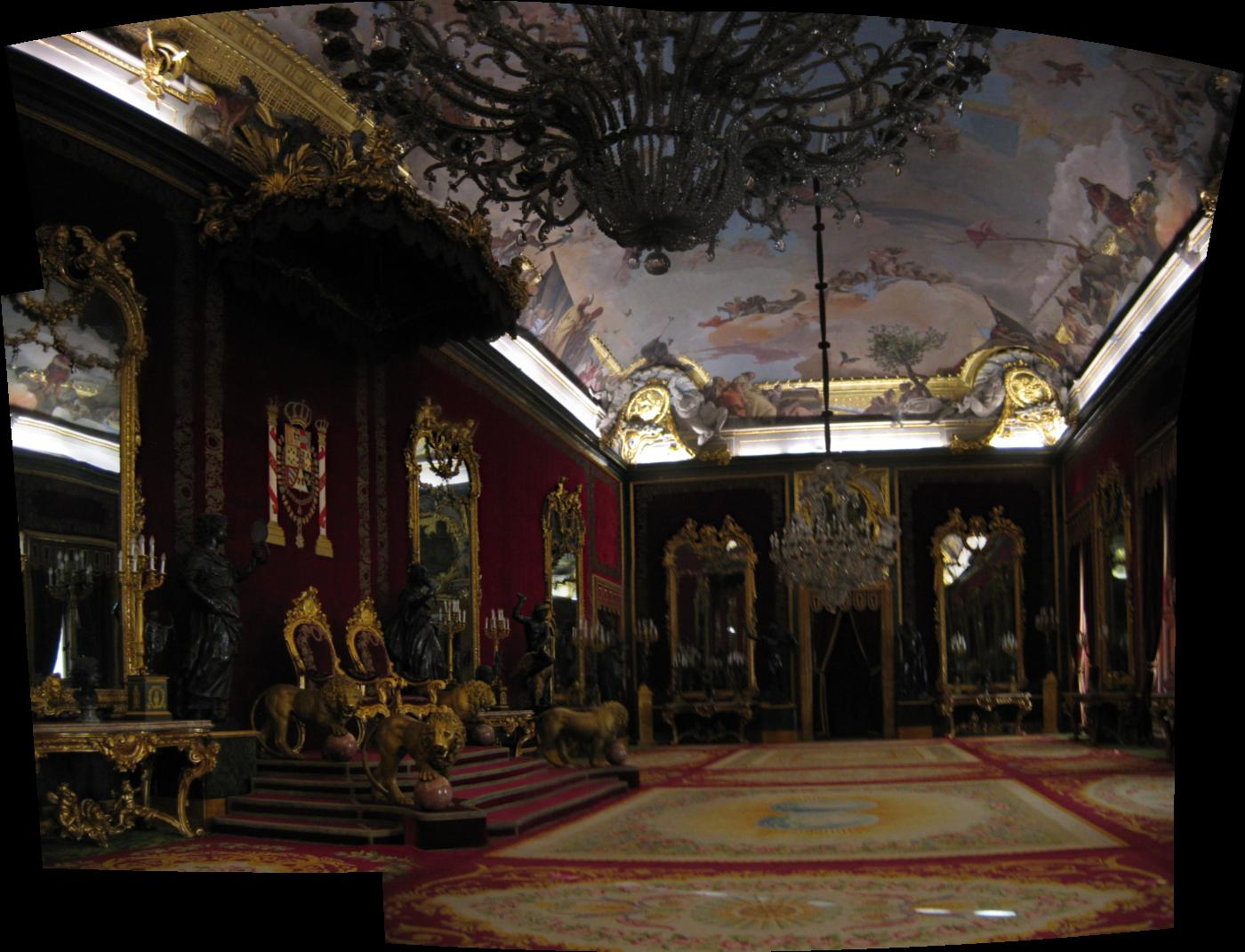 Troonzaal in het Palacio Real in Madrid.